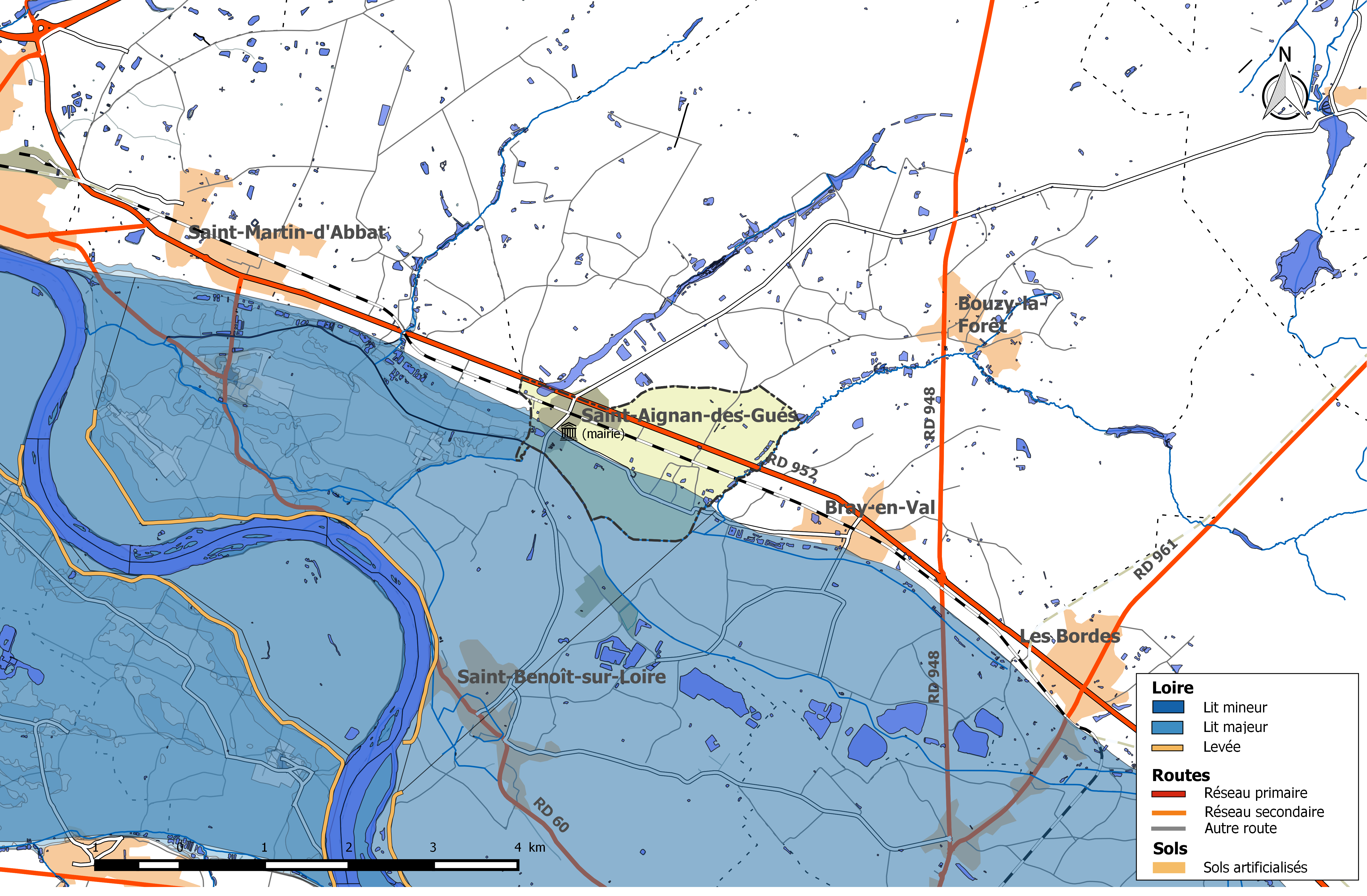 Zone inondable et réseaux hydrographique et routier de la commune de Saint-Aignan-des-Gués.